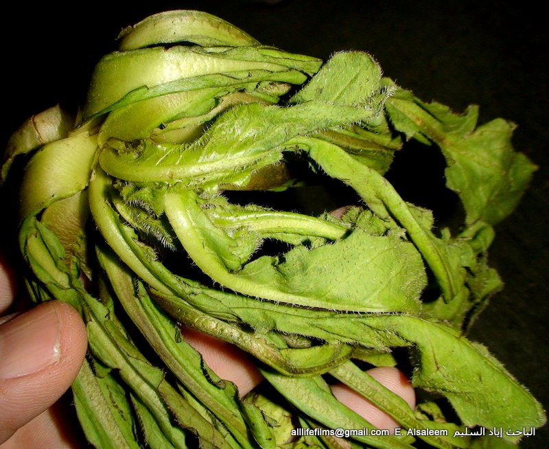 نباتات برية سورية تؤكل